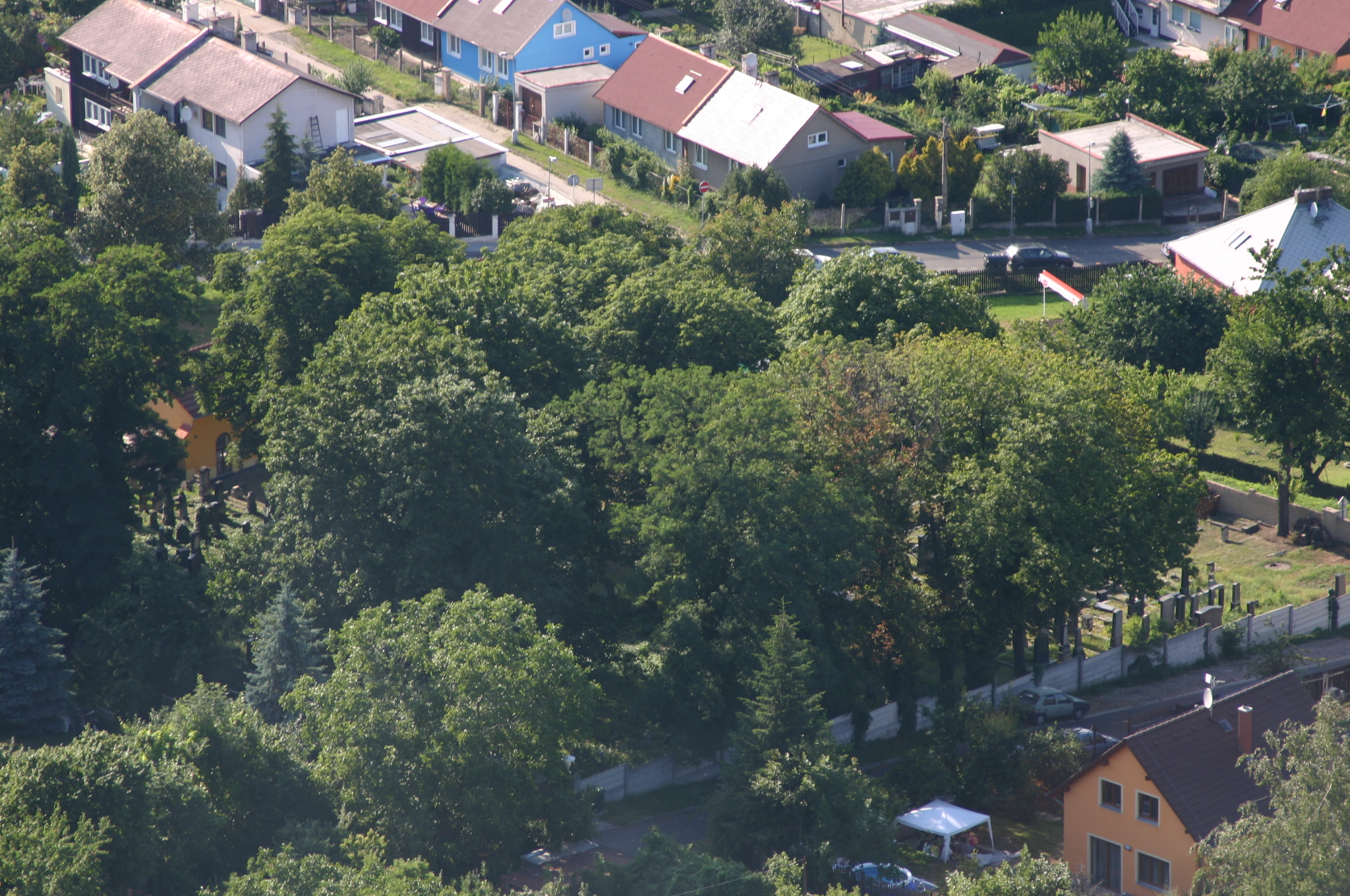 Jüdischer Friedhof im Stadtviertel Souš (Tschausch) in Most (Brüx)